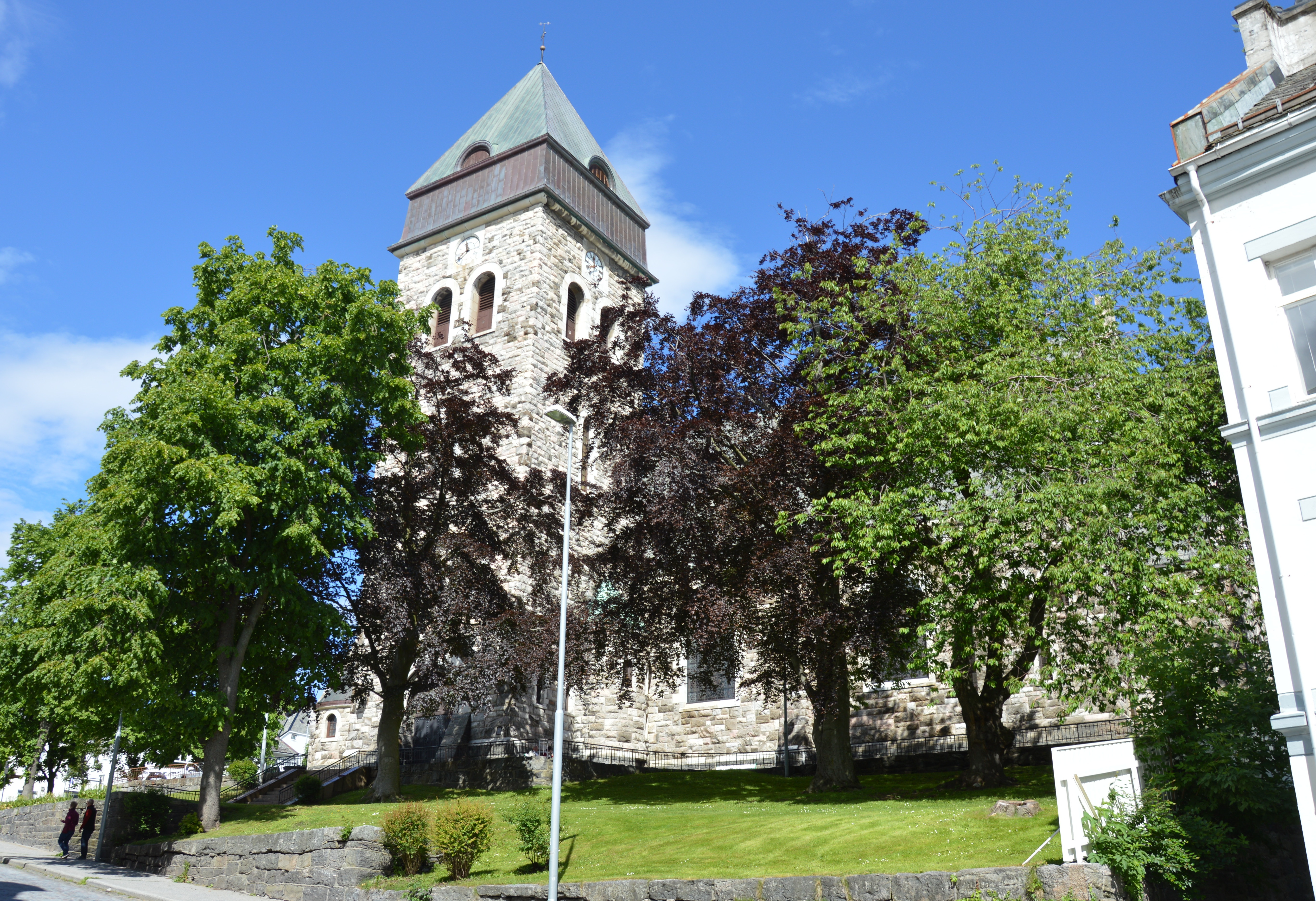 Kirche von Alesund